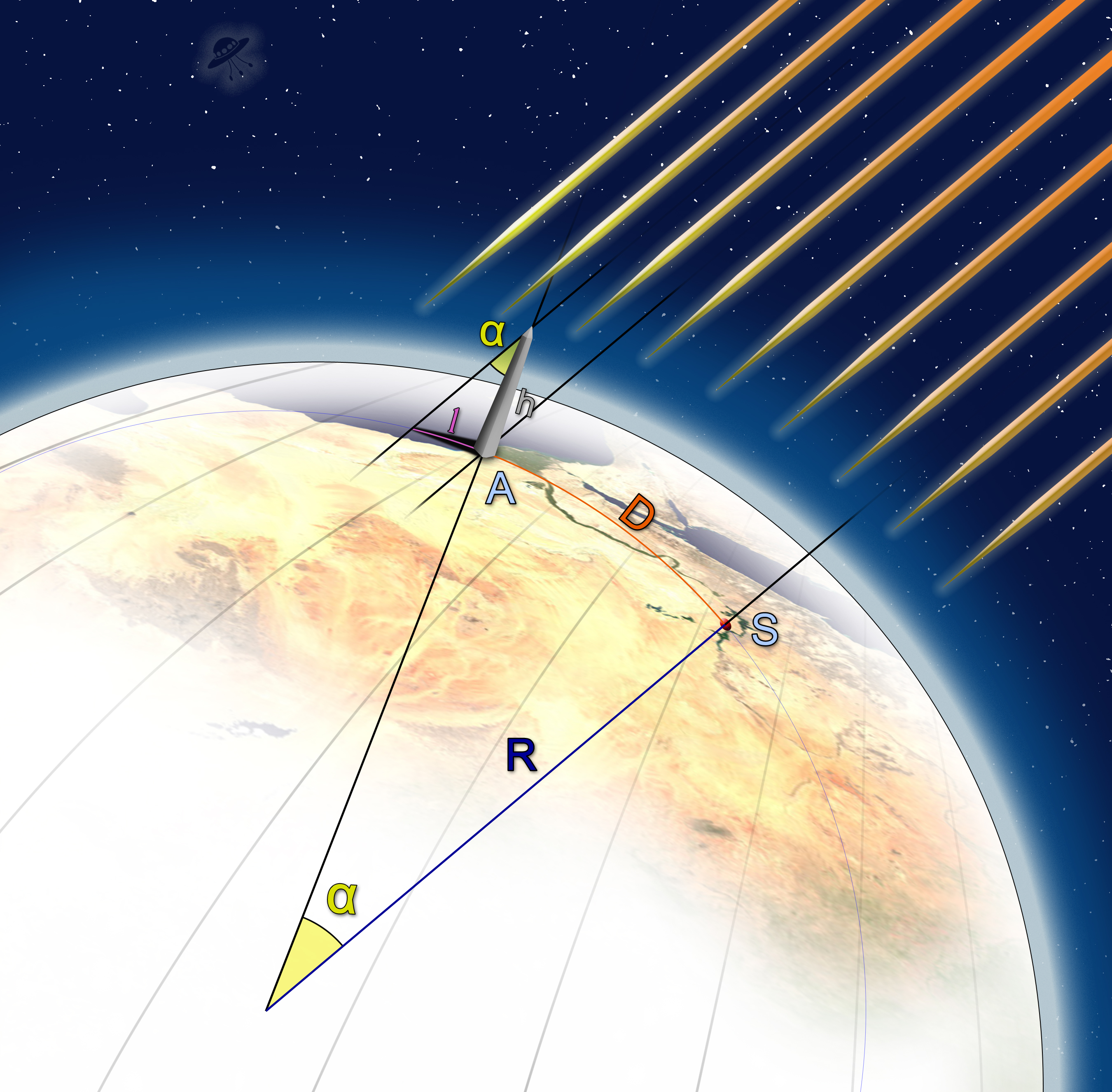 Calcolo del raggio terrestre secondo il metodo di Eratostene Francesco De Lorenzo (fr.dl CHIOCCIOLA tiscali.it) è l'autore di questa immagine e l'ha rilasciata sotto licenza GFDL